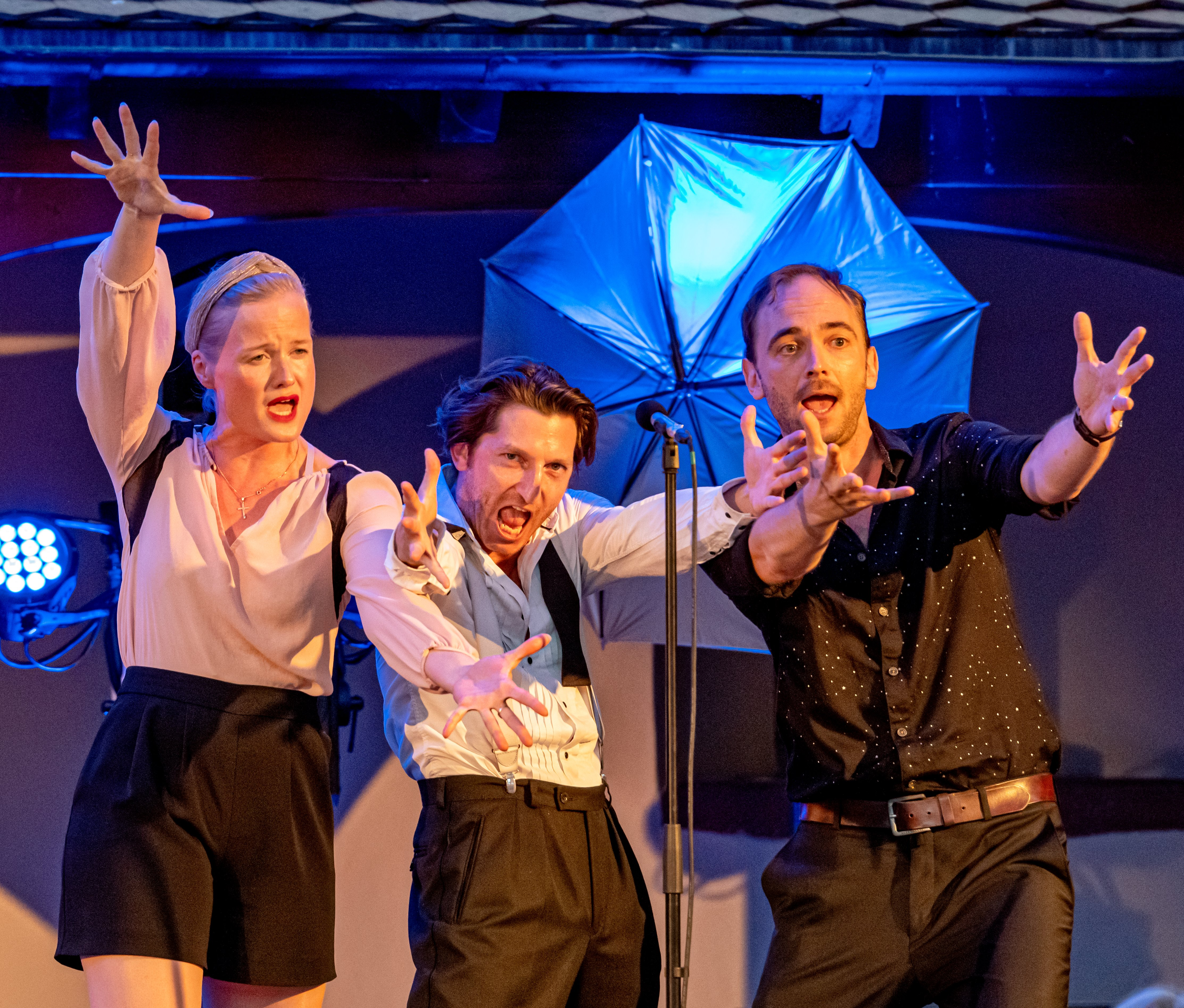 Bilder vom Black Forest Voices Festival in Kirchzarten. Ein Festival mit Workshops für Chöre und A Capella Gesang vom 27. 6. 2019 zum 30.06. 2019